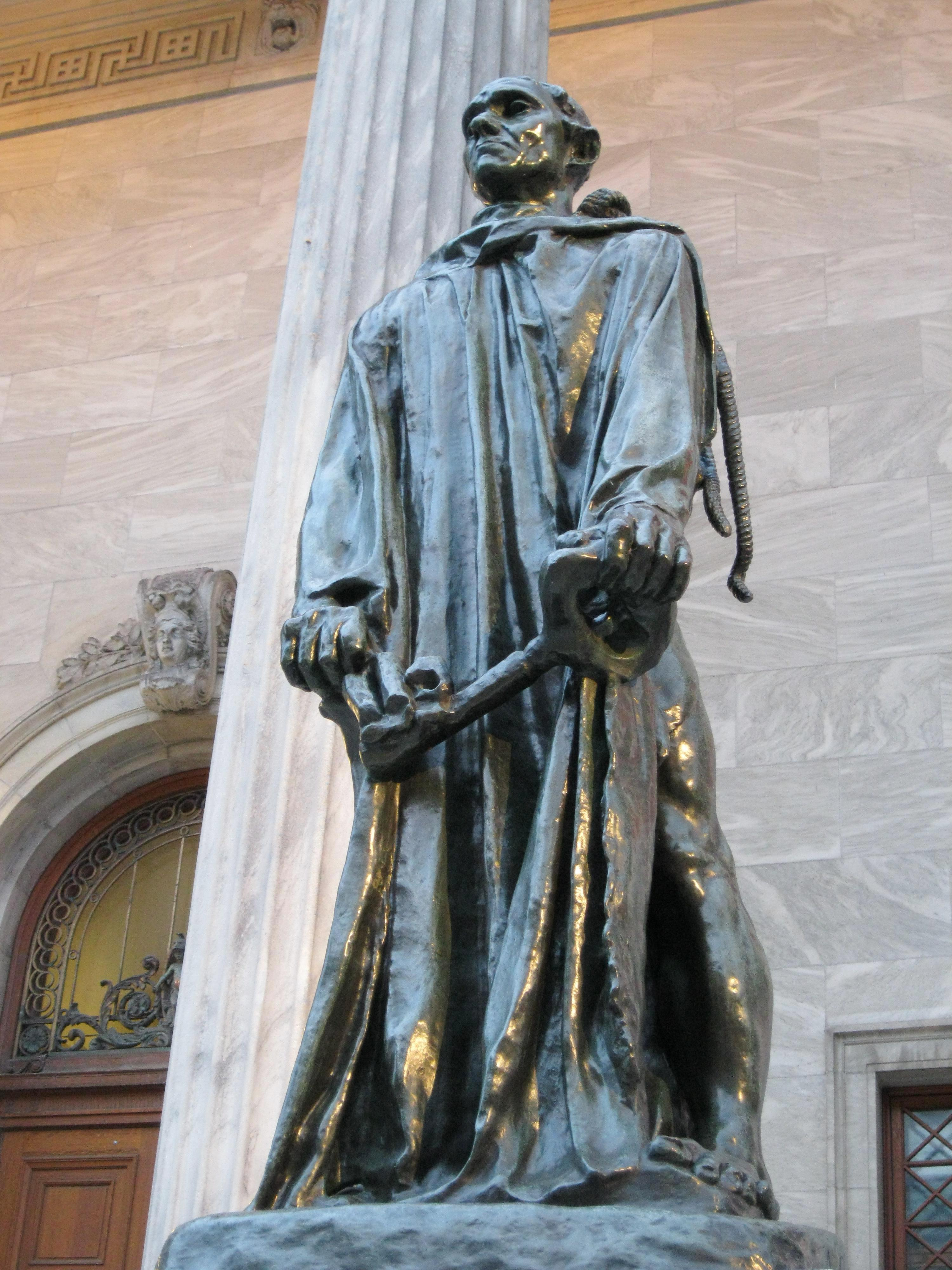 Jean d'Aire (1887) (fonte 1966), œuvre d'Auguste Rodin, située devant le pavillon Michal et Renata Horstein du Musée des beaux-arts de Montréal, 1379, rue Sherbrooke Ouest (côté nord)